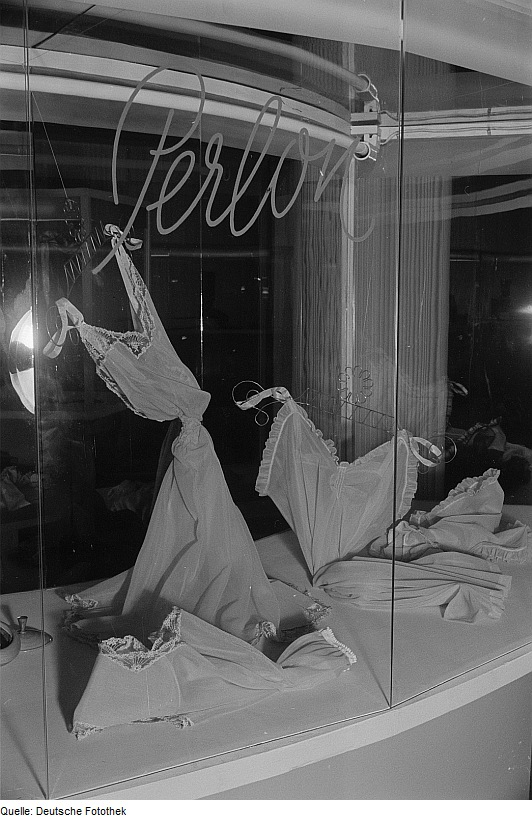 Original image description from the Deutsche Fotothek Messestand mit Damenunterwäsche (Perlon)